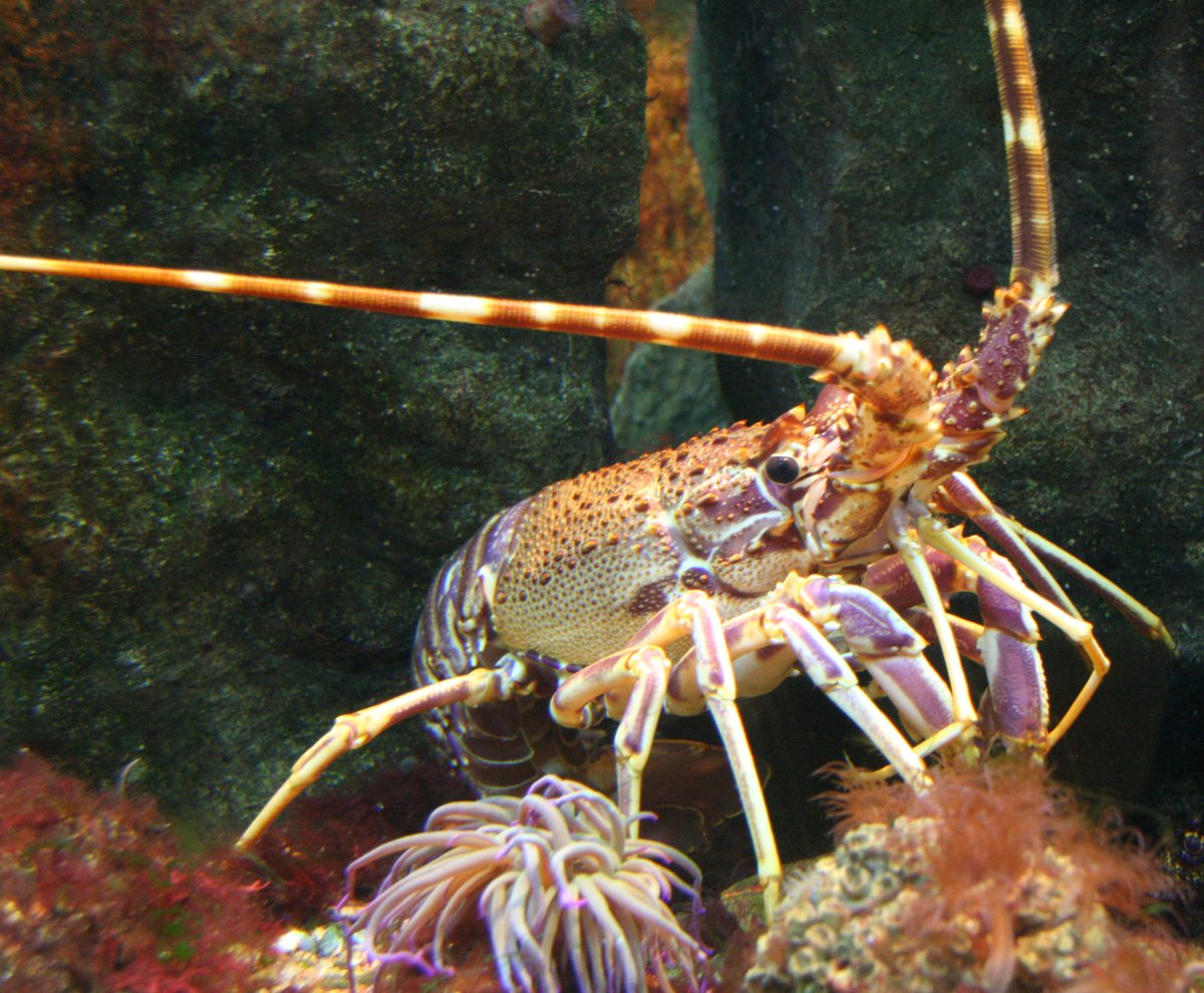 Europäische Languste (Palinurus elephas)